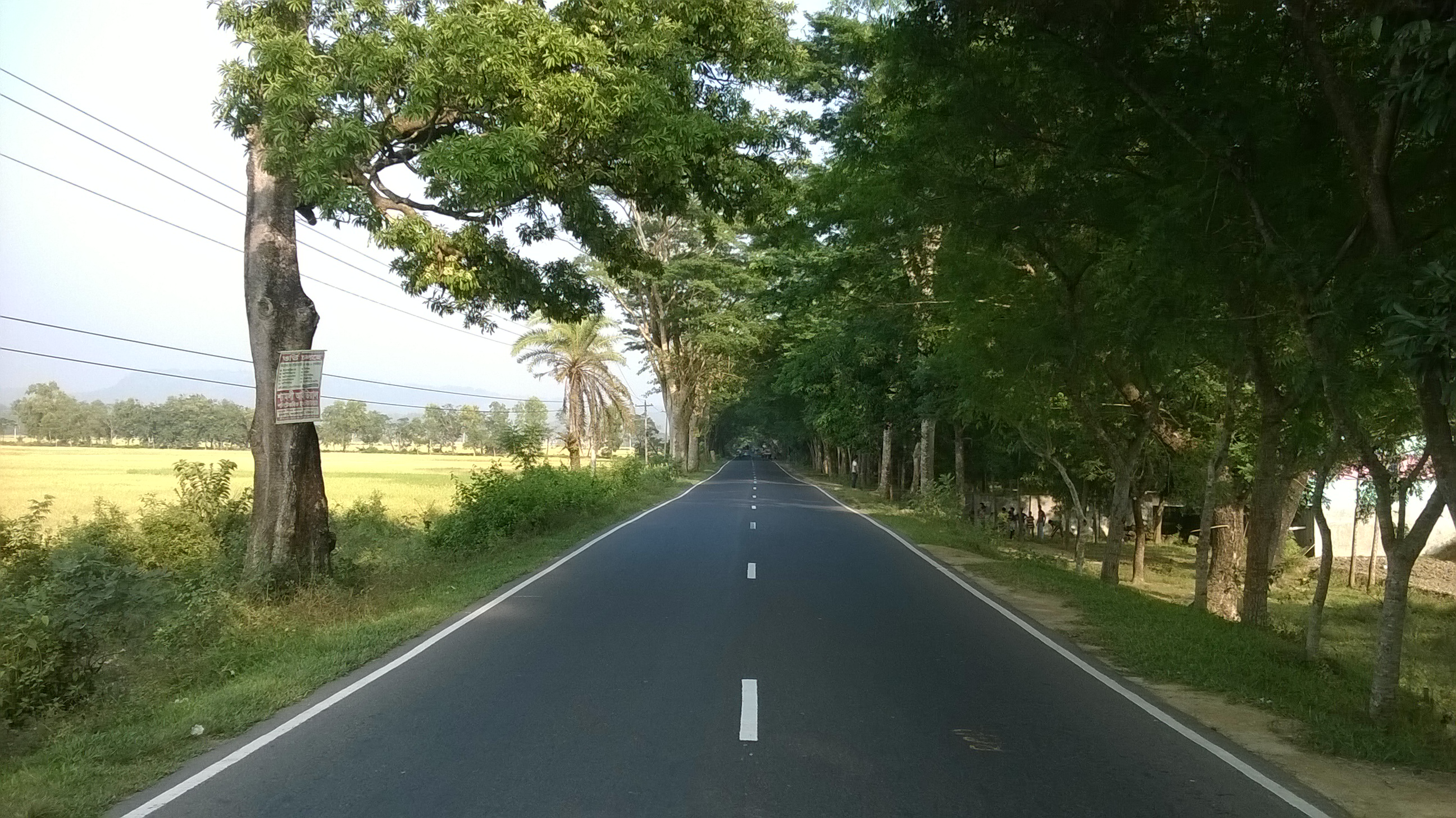 ইউনিয়নের প্রধান যোগাযোগ ব্যবস্থা